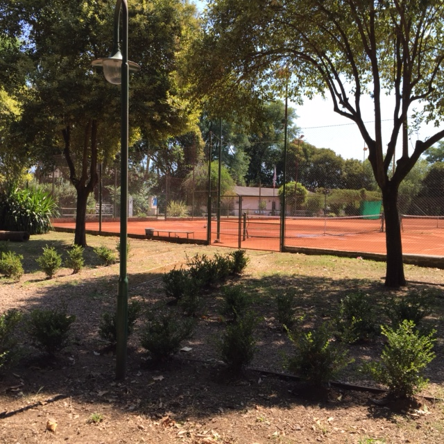 Situado en las calles Pedro Martini y 19 de Marzo